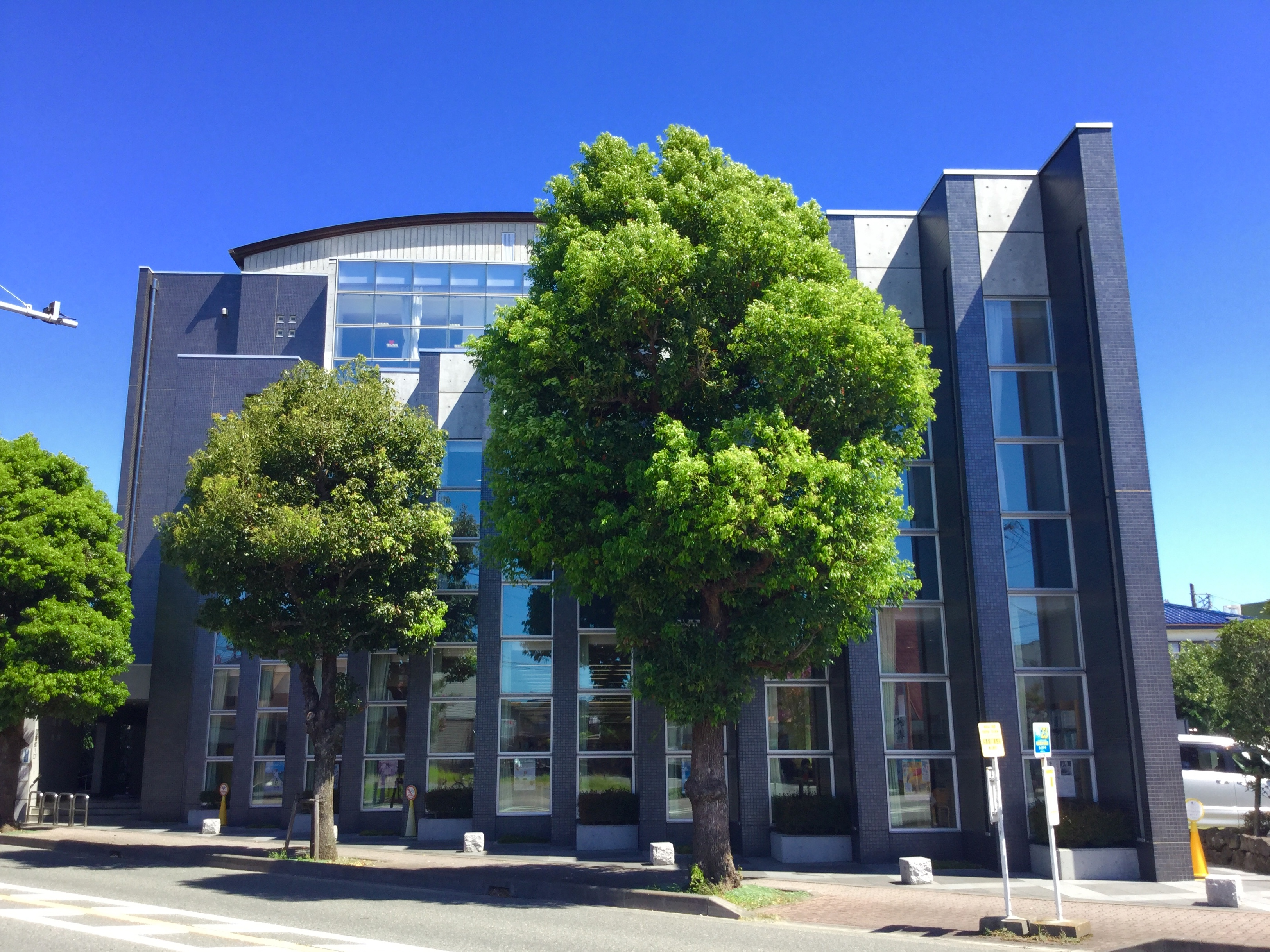 神奈川県にある寒川総合図書館